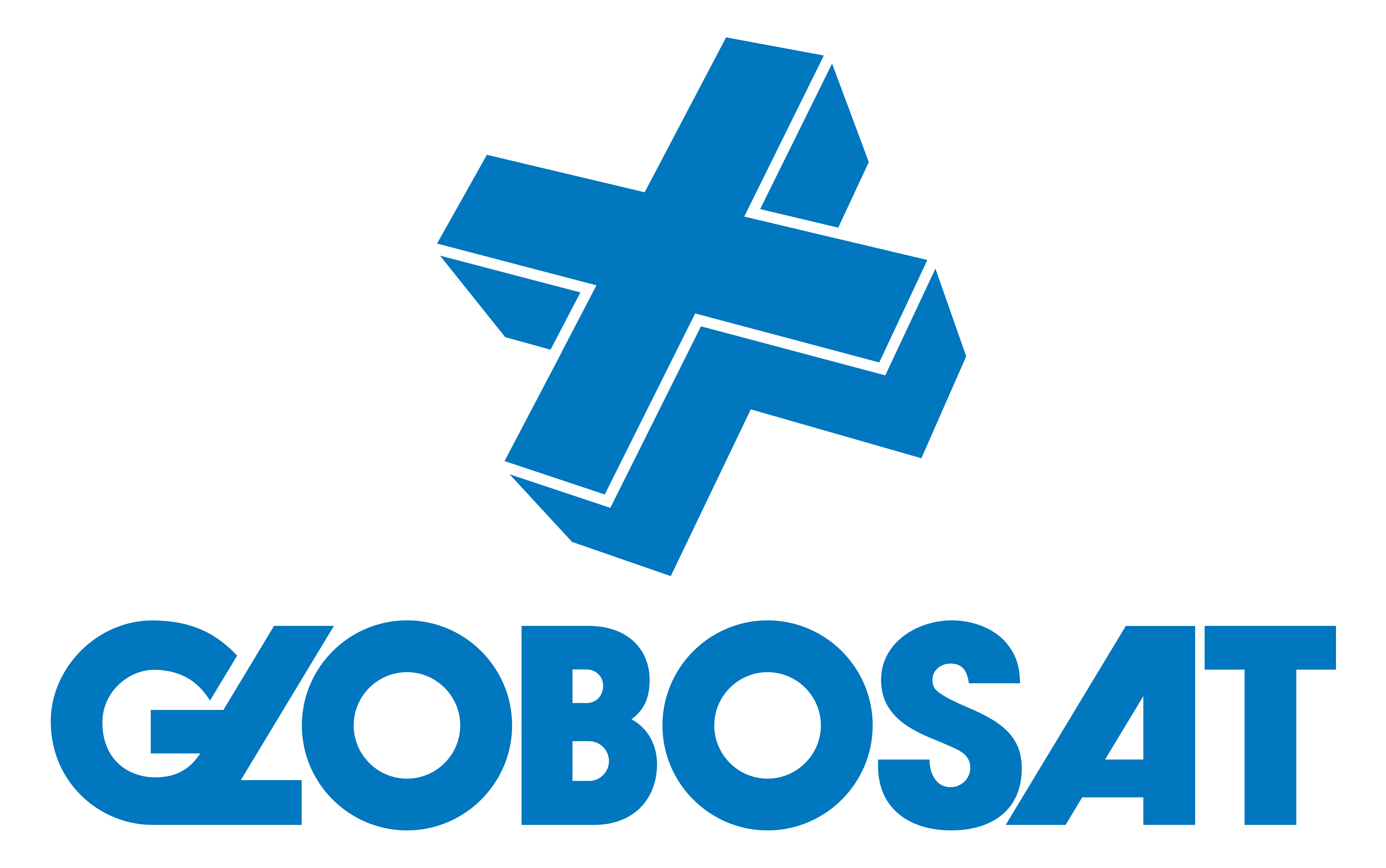 Logotipo Canal +Globosat The logo of +Globosat